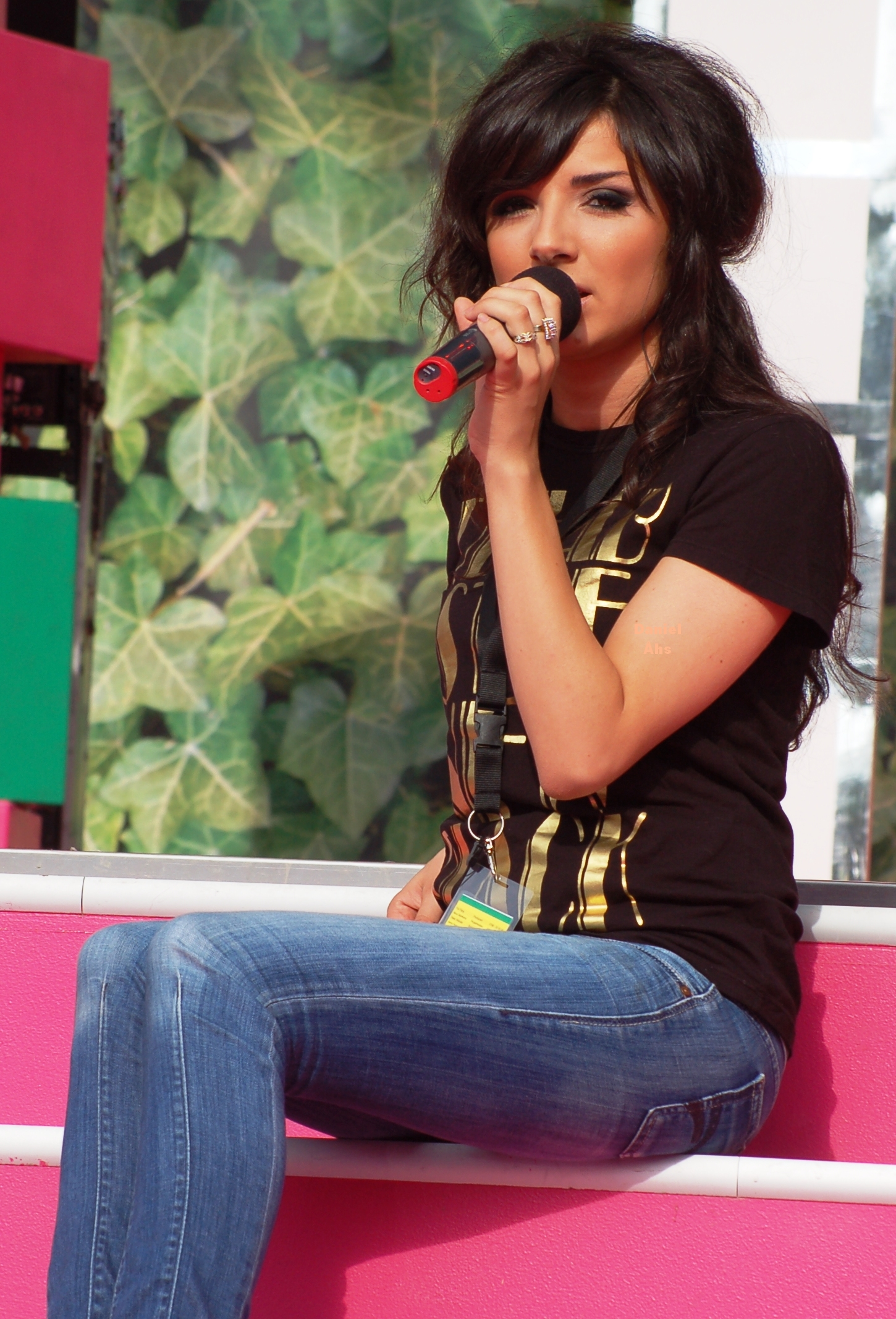 Sibel på Sommarkrysset, Gröna Lund 2008.